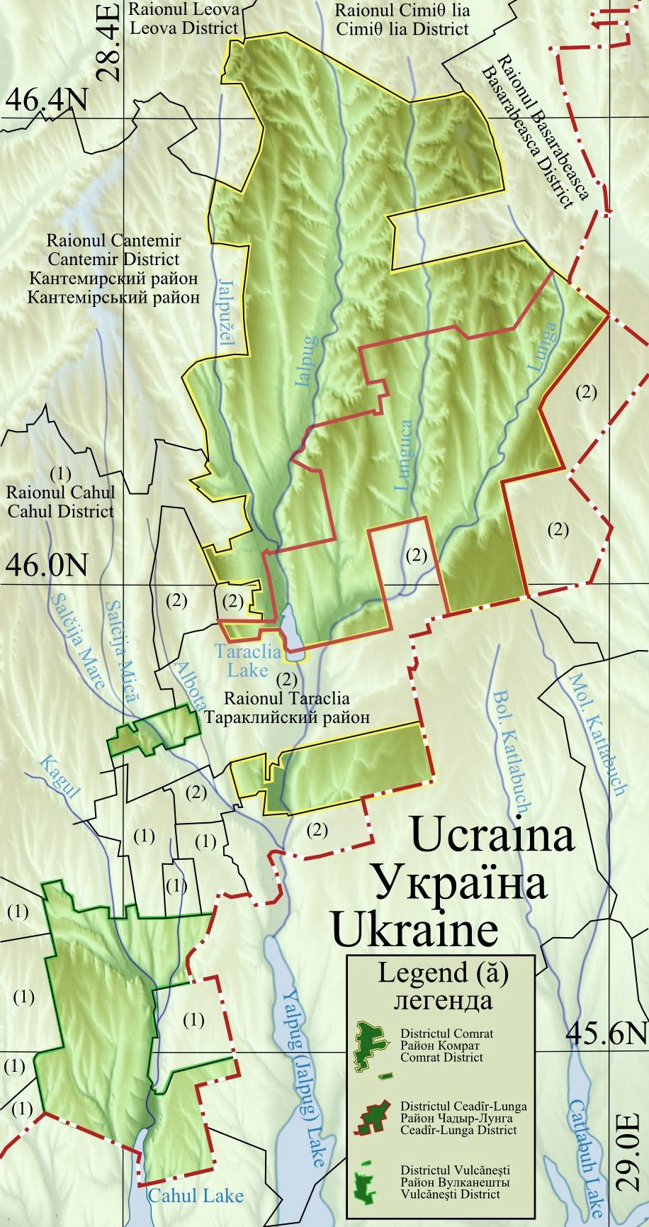 Harta de localizare a localitatilor din Gagauzia, Republica Moldova